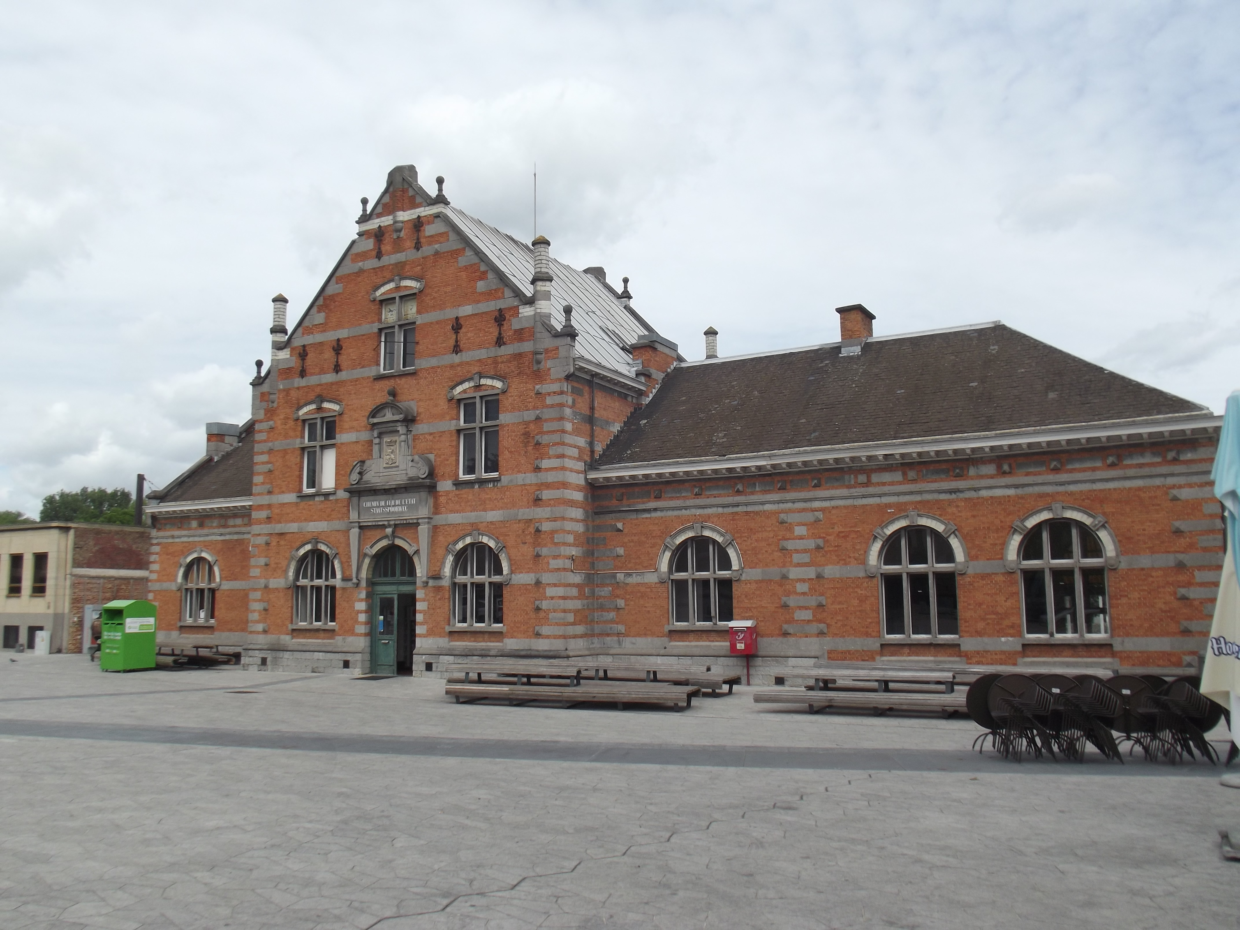 Het station van Jette in 2015